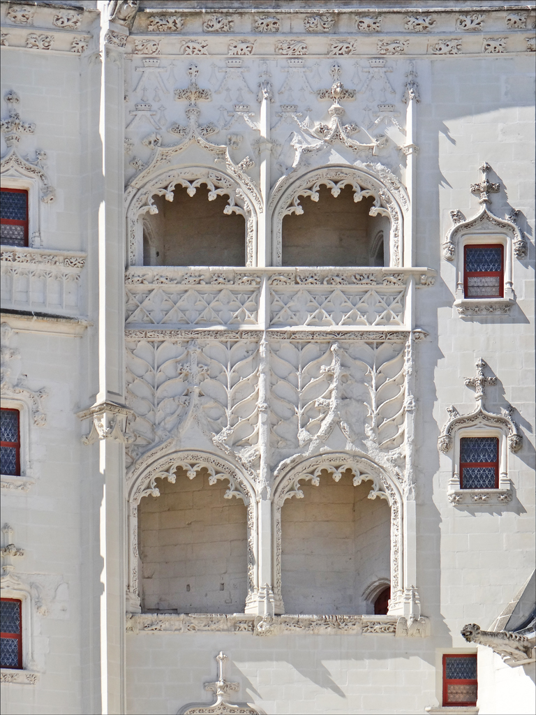 Les loggias de la tour de la Couronne d'Or. La tour centrale a été achevée sous Anne de Bretagne dont le mariage avec le Roi Louis XII a été célébré en 1499 dans la chapelle (aujourd'hui disparue) du château. Jusqu'à la fixation de la cour à Versailles sous Louis XIV en 1683, la monarchie française a conservé une tradition de nomadisme. Lorsque le Roi passait à Nantes, le château lui servait de logement. Site du château-musée